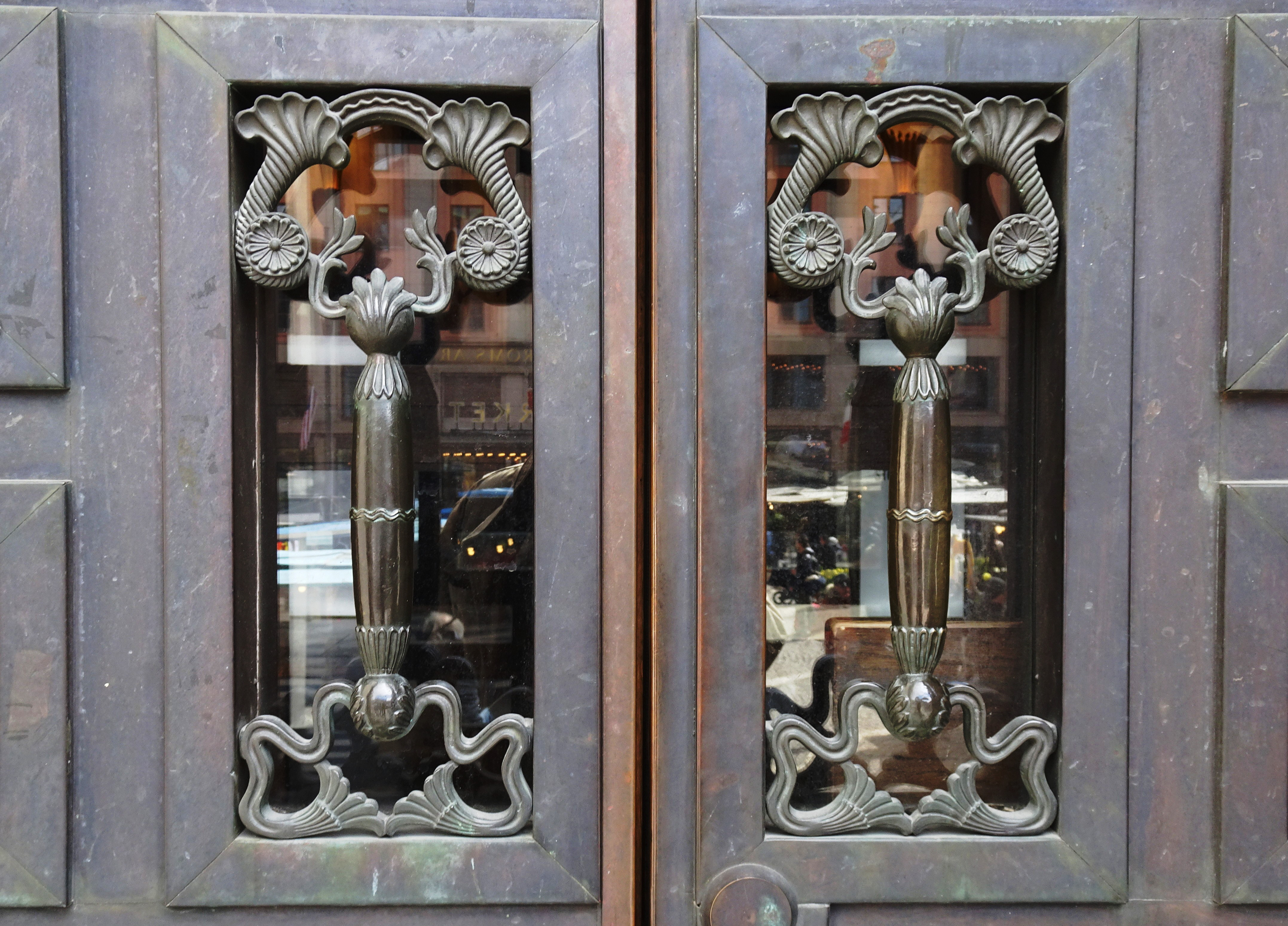 Konserthuset, Stockholm, handtag på huvudportalen